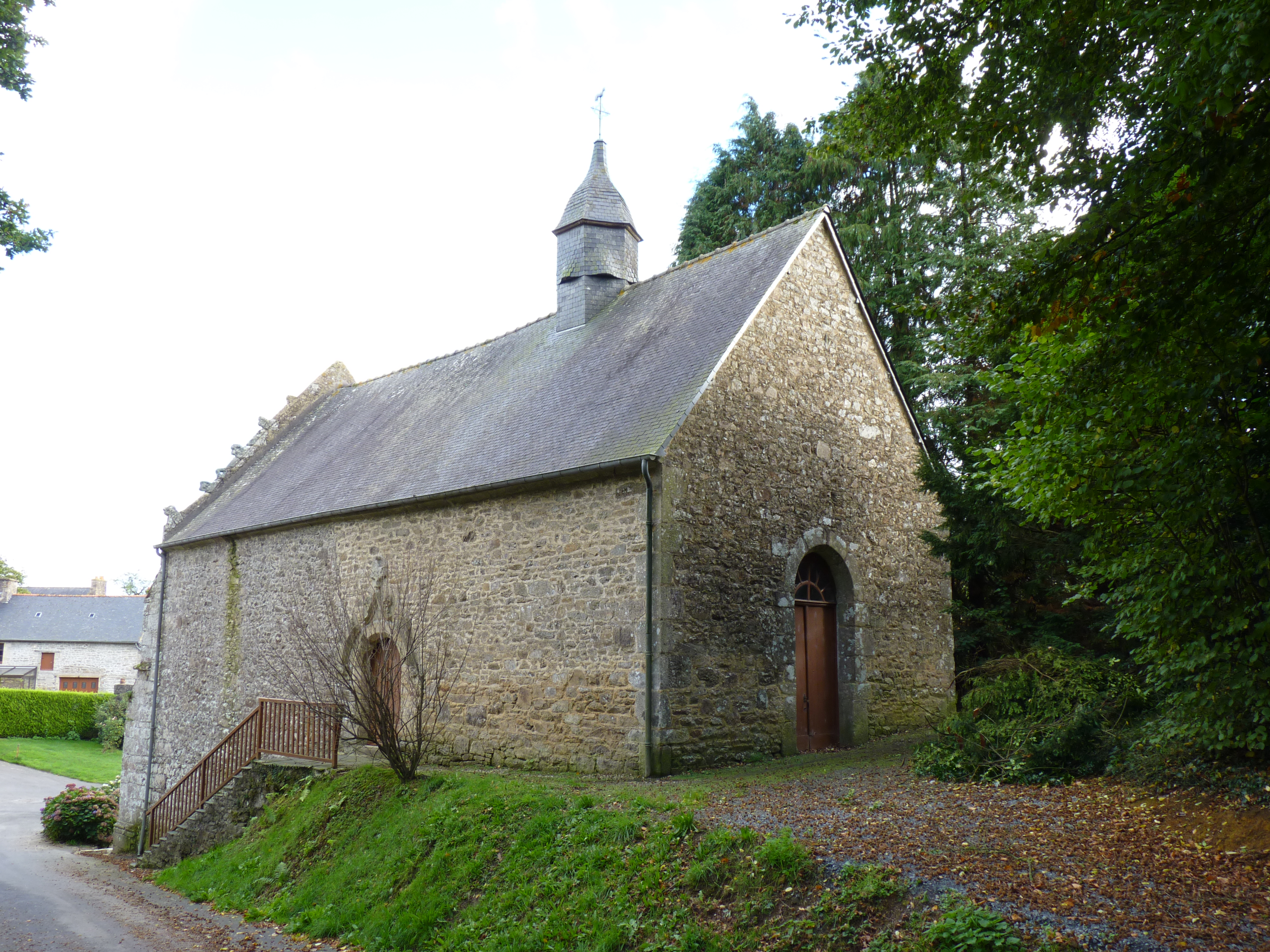 Chapelle du 16ème siècle et fontaine Saint Avit adossée à l'édifice.